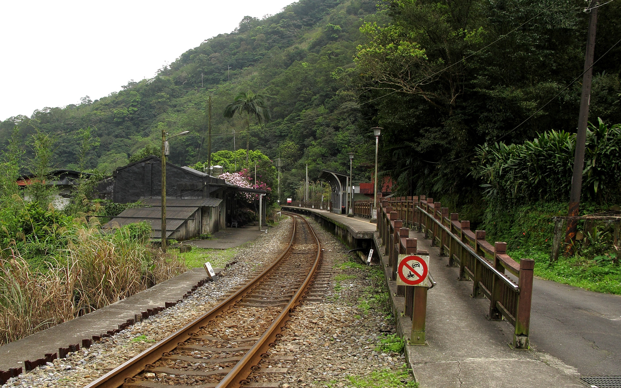 Dahua Station